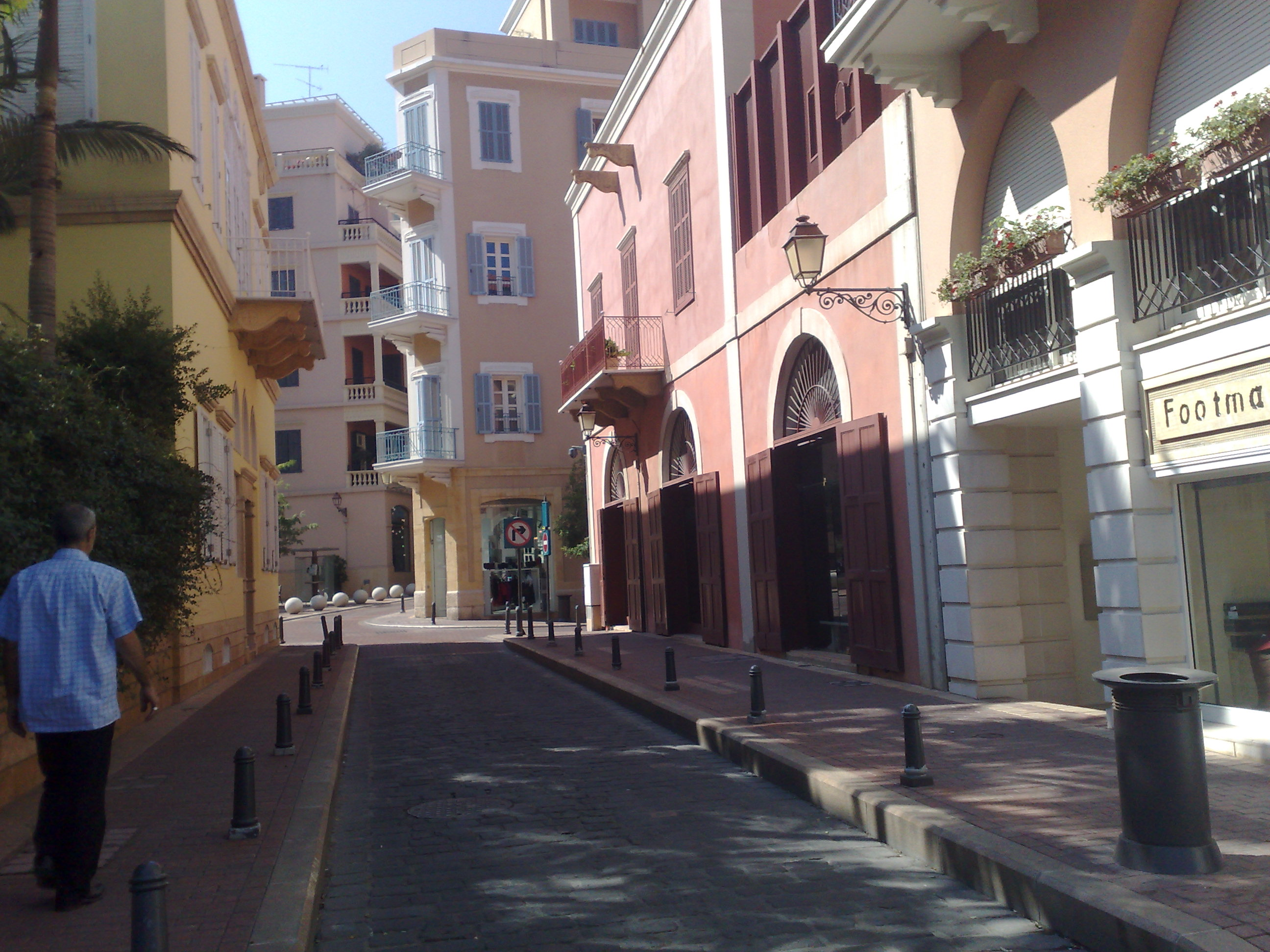 Beirut 002